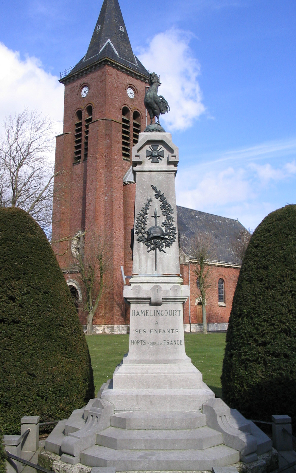 Monument aux morts d'Hamelincourt